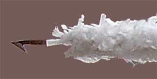 Encerrona con 6 toros en solitario en la Plaza Monumental de Tijuana domingo 3 de octubre de 2010